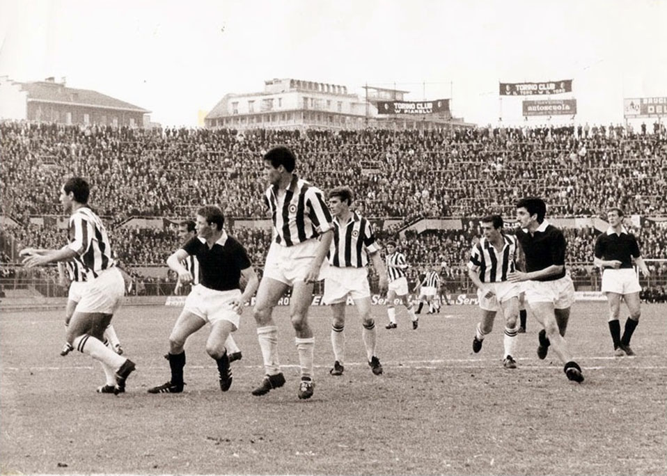 Una fase di un derby della Mole tra Juventus e Torino nella stagione 1965-66.